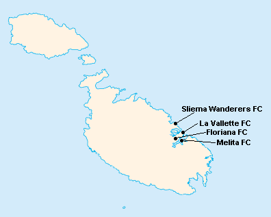 Répartition des clubs en First Division Maltaise 1944-1945.